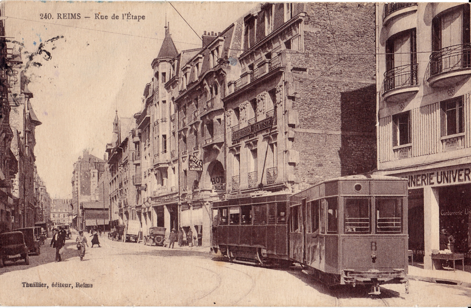 Carte postale ancienne éditée par Thuillier à Reims, n°240 :REIMS - Rue de l'Etape